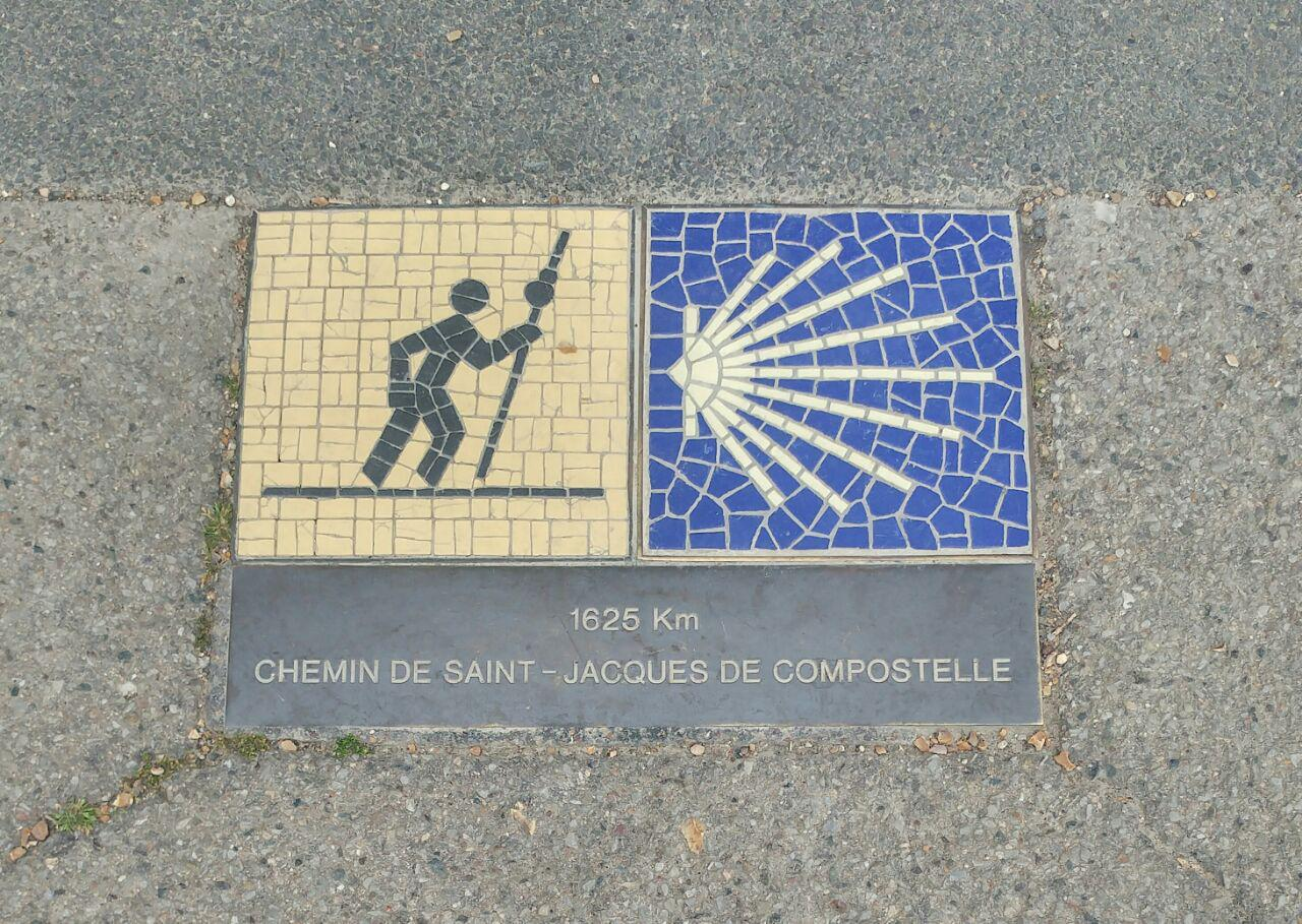 La plaque devant la Cathédrale de Chartres avec indication de la distance à Saint-Jacques-de-Compostelle